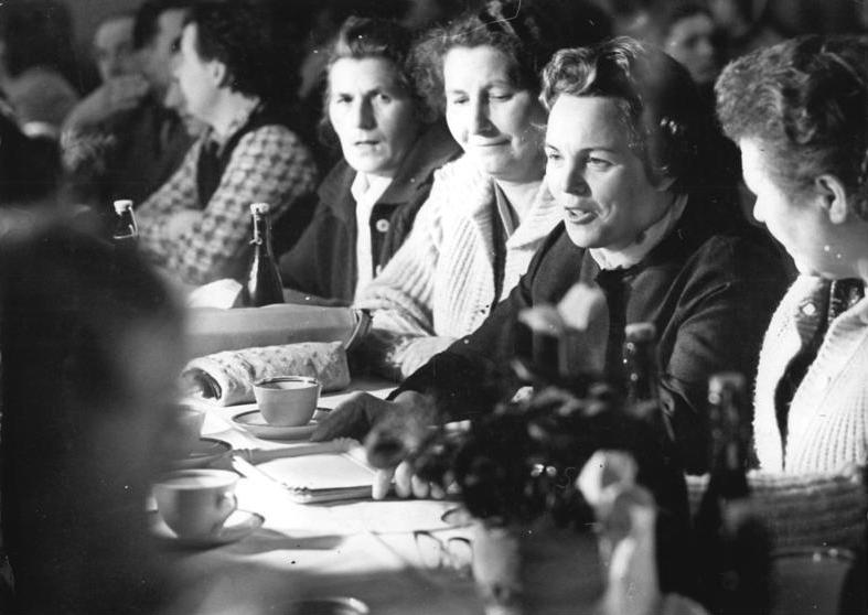 LPG Schenkenberg, Jahreshauptversammlung Zentralbild Schurig krue-zi 28.1.1966 Jahreshauptversammlung in der LPG "7.Oktober" in Schenkenberg Mitten in ihrer Brigade diskutiert das Mitglied des Staatsrates und Volkskammerabgeordnete Else Merke (2.v.r.) während einer Pause bei der Jahreshauptversammlung der LPG "7.Oktober" in Schenkenberg, Kreis Delitzsch am 27.1.1966. Die LPG erzielte 1965 die bisher besten Ernteergebnisse. Im Vergleich zum Vorjahr erhöhten sich die Erträge je Hektar in Getreide von 31, 9 auf 38, 7 dt, bei Kartoffeln von 170 auf 206dt und bei Zuckerrüben sogar von 274 auf 386, 5 dt.